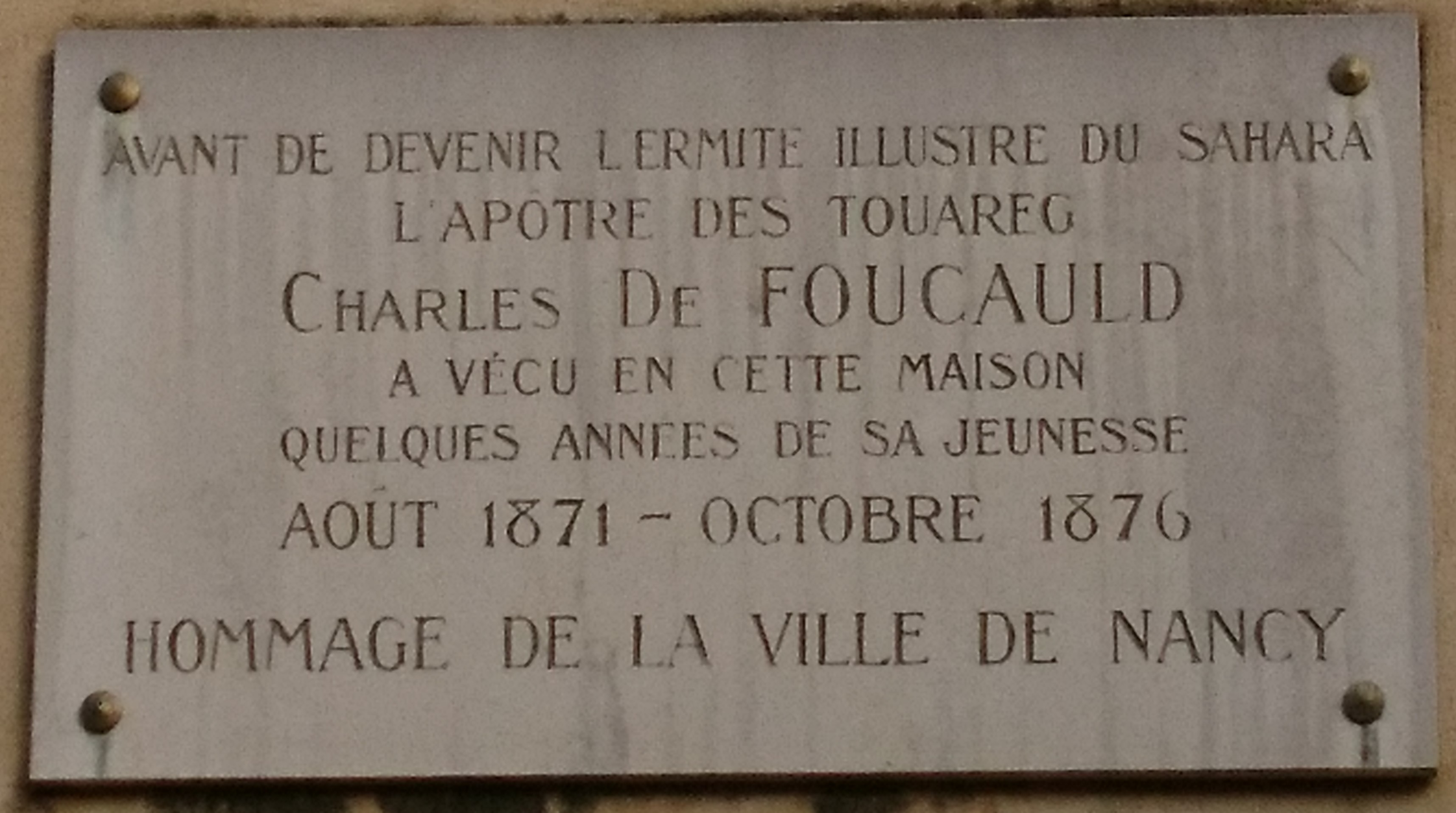 Plaque rappelant que Charles de Foucauld a vécu dans cet immeuble